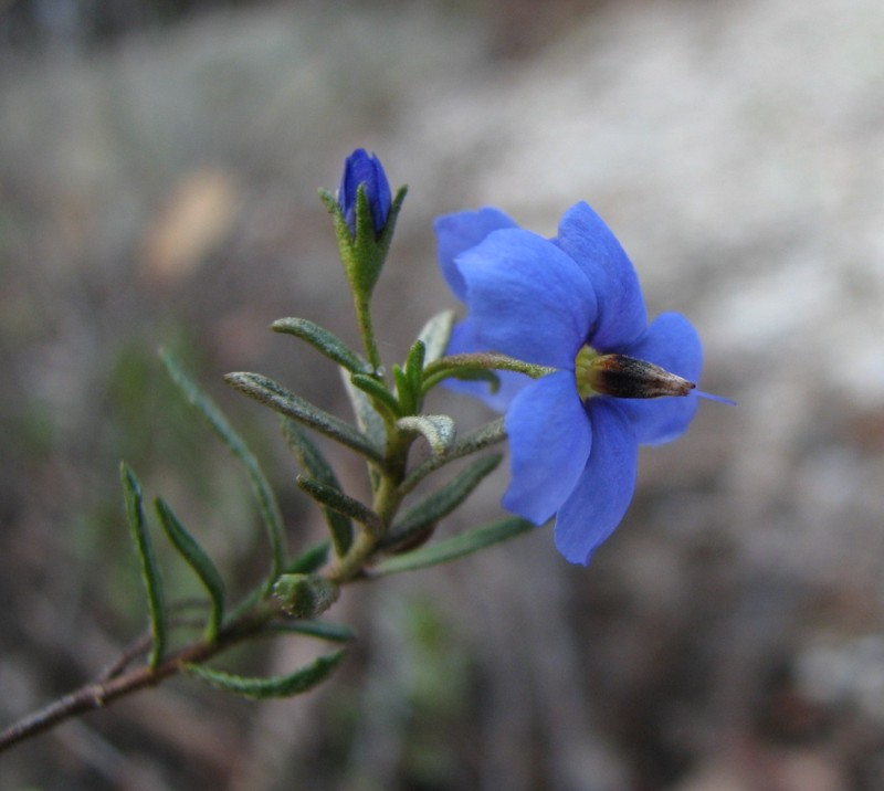 Halgania cyanea, Maranoa Gardens, Balwyn, Victoria, Australia